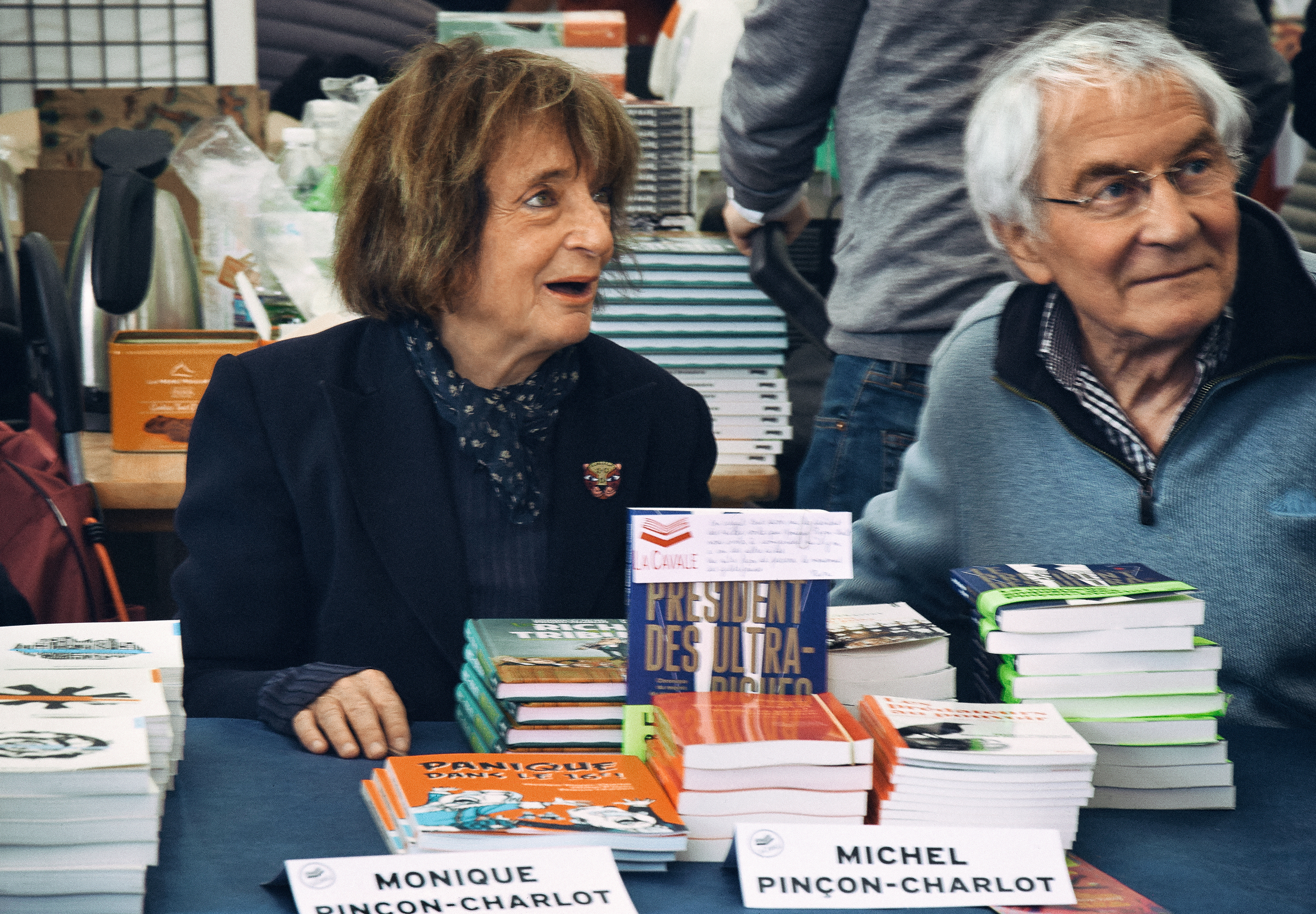 Monique Pinçon-Charlot et Michel Pinçon, invités à la 34ème Comédie du livre de Montpellier (2019).